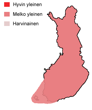 Jouhisorsan levinneisyys Suomessa. Dark red: Common Middle red: Quite common. Light red: Rare.